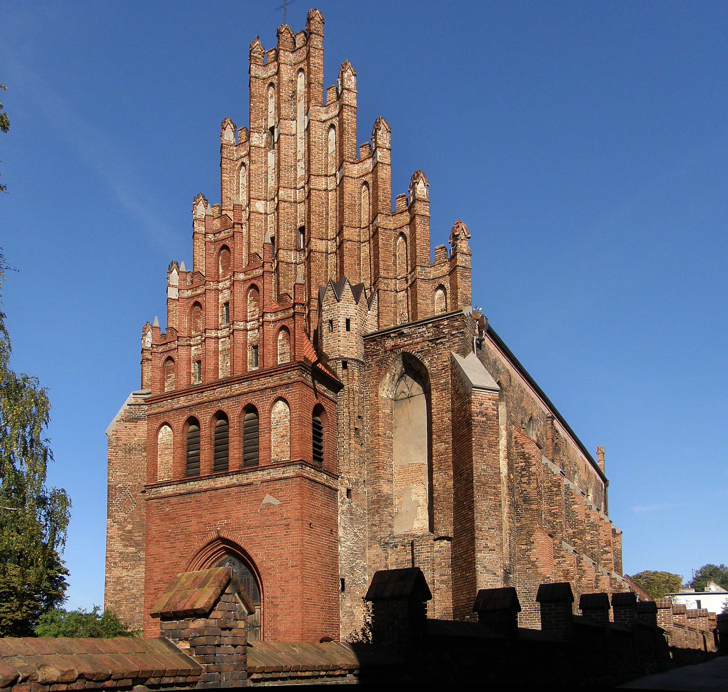 Chełmno - podominikański kościół p.w. św. Piotra i Pawła